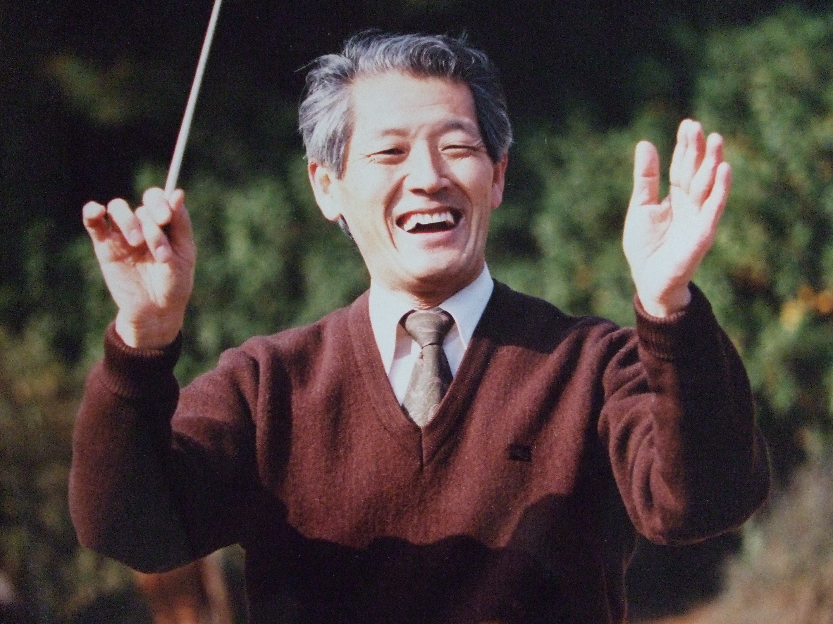 小宮路 敏